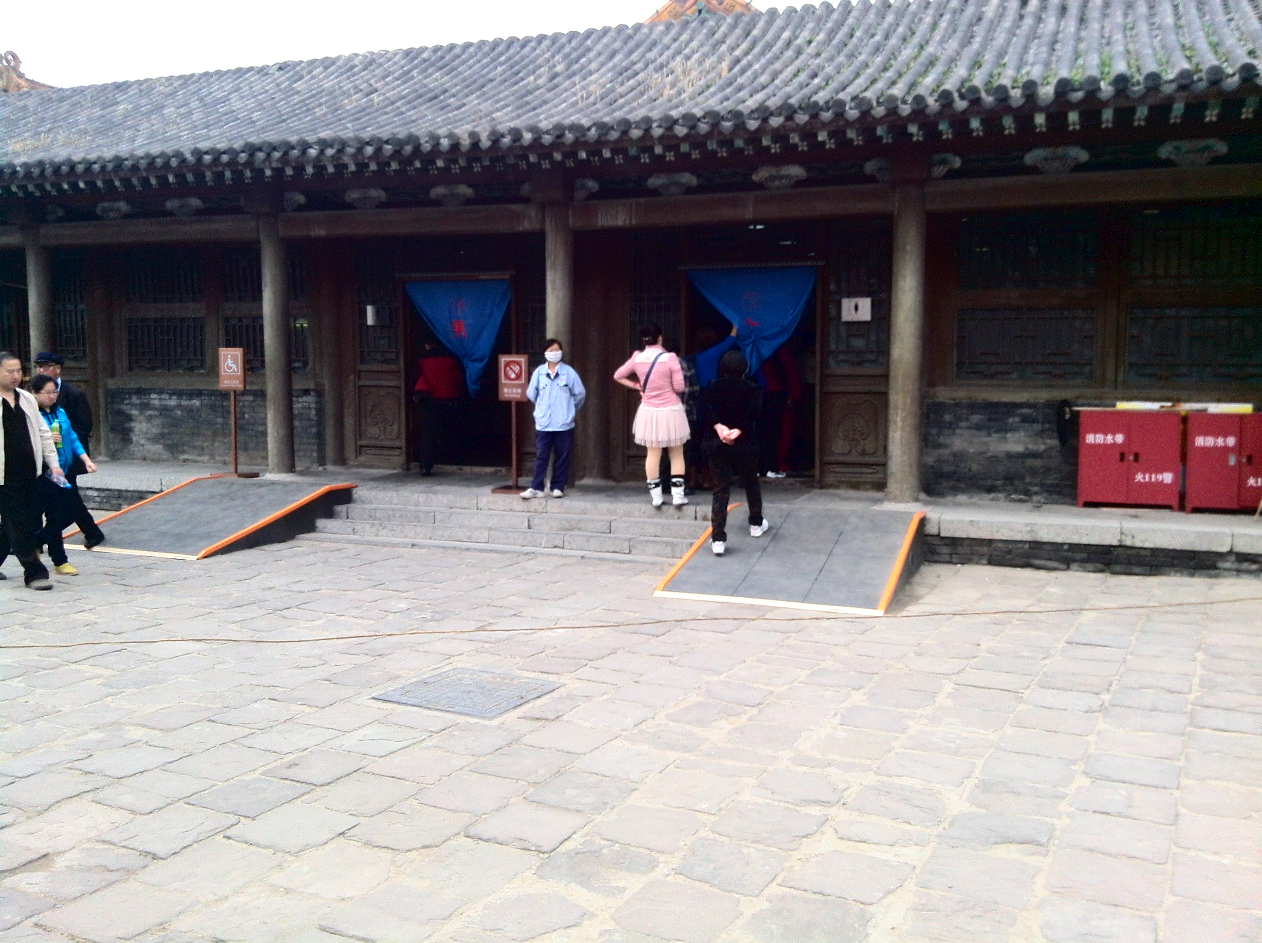 沈阳故宫